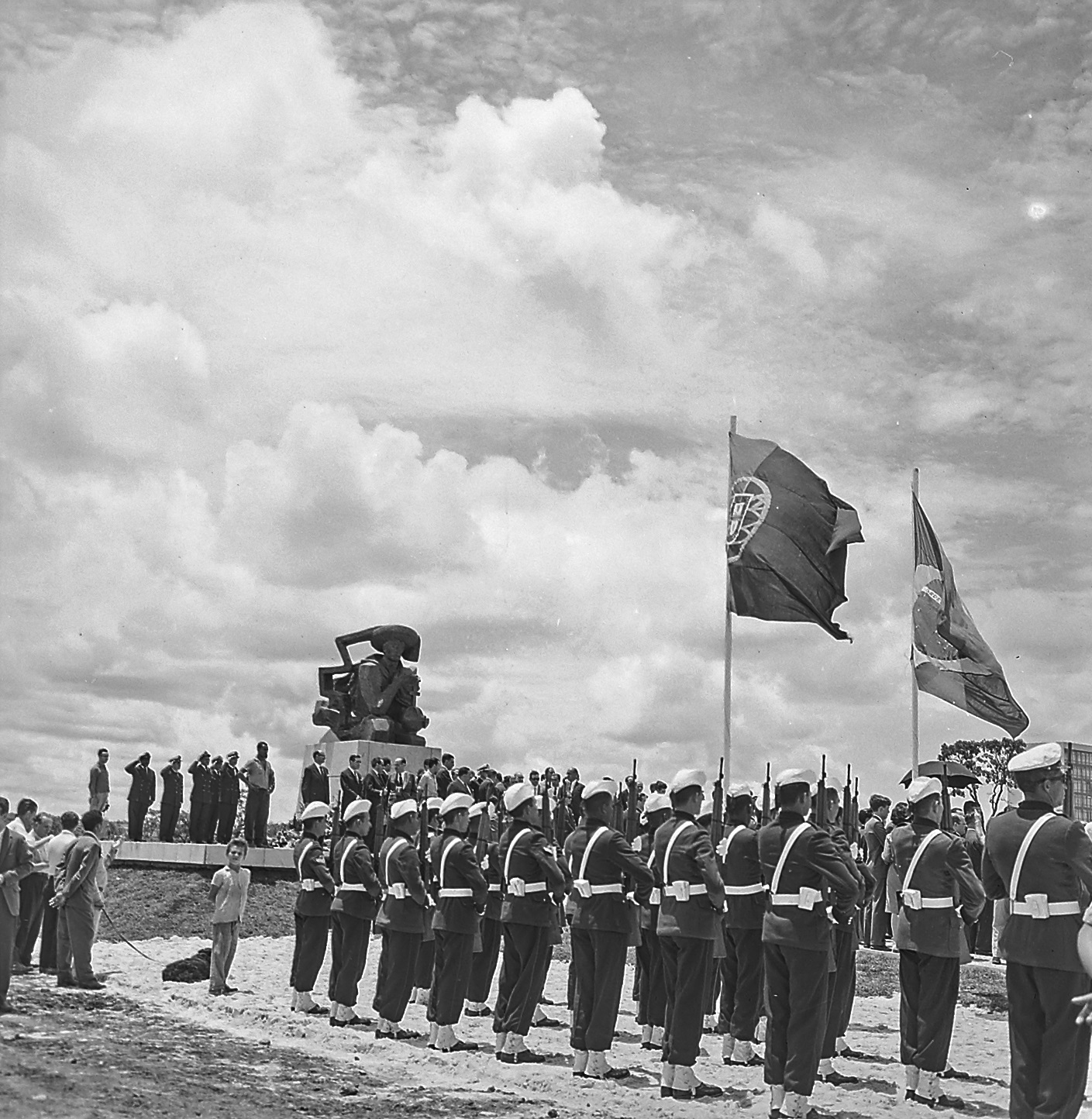 Imagem do Fundo Agência Nacional, do Arquivo Nacional